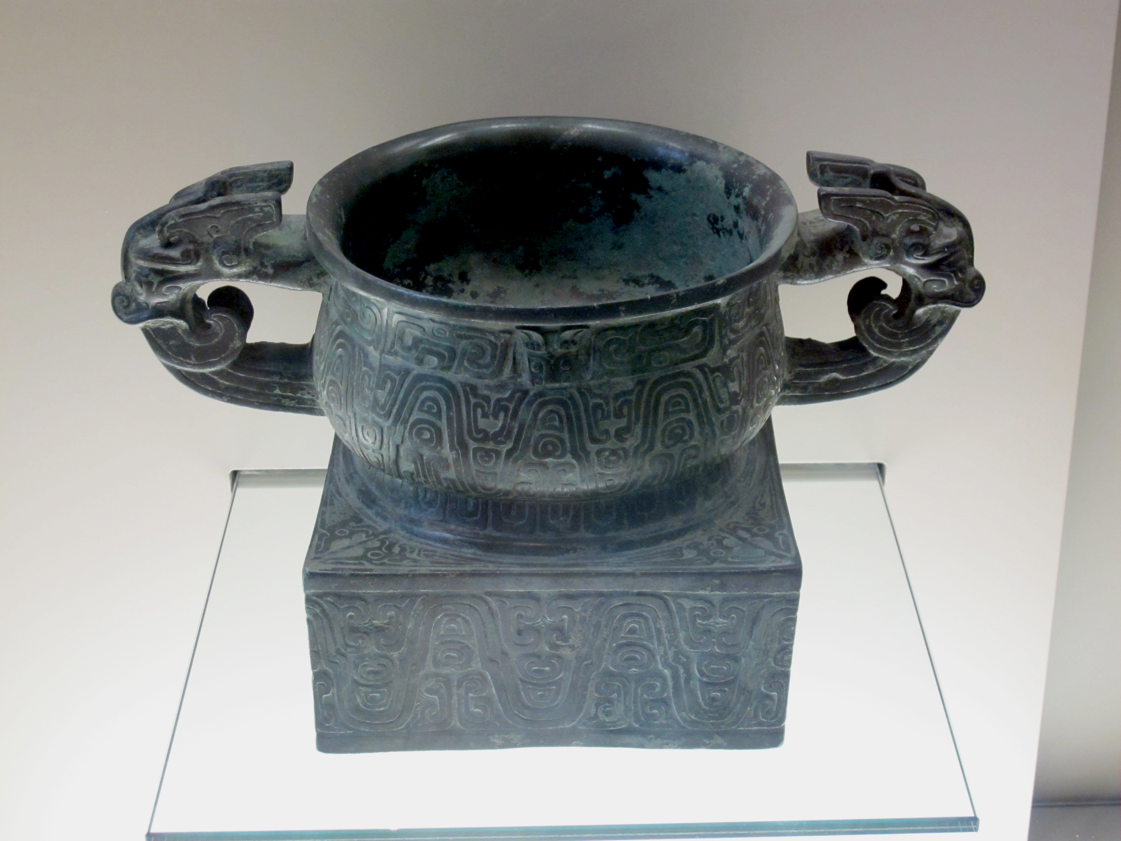 Vase gui pour les céréales. IXe siècle – début du VIIIe siècle av. JC, Dynastie des Zhou de l’ouest (vers 1050 – 771 av. JC).